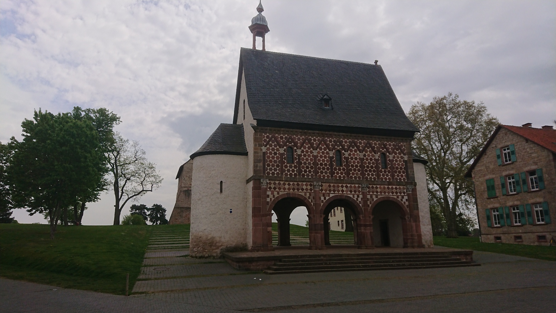 Kloster Lorsch - Karolingische Torhalle